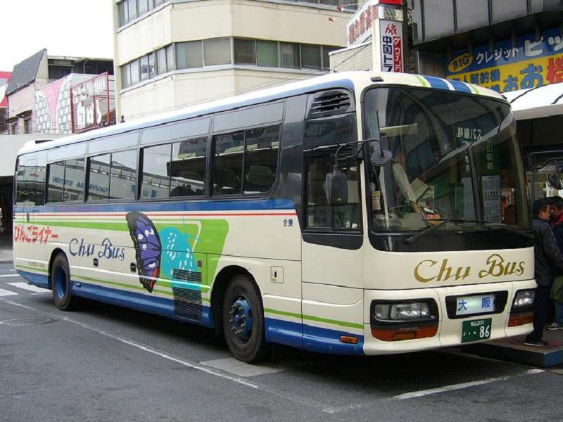 登録番号 福山200か・・86 中国バス所属 びんごライナー号用 2005年12月18日 福山駅前にて撮影 撮影者 Tokatsu kokubu